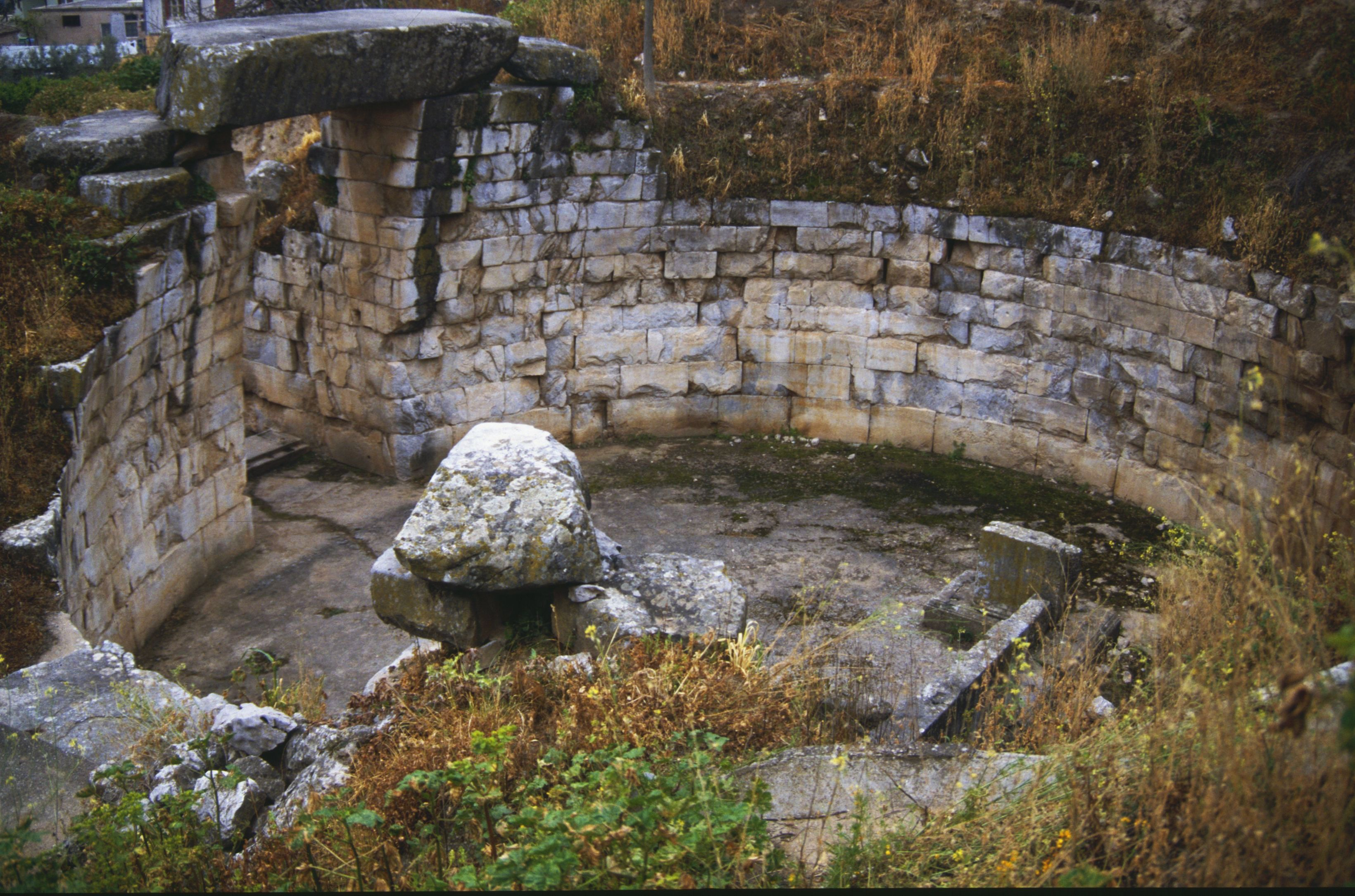 mykenisches Kuppelgrab in Orchomenos, 14. Jh. v. Chr.